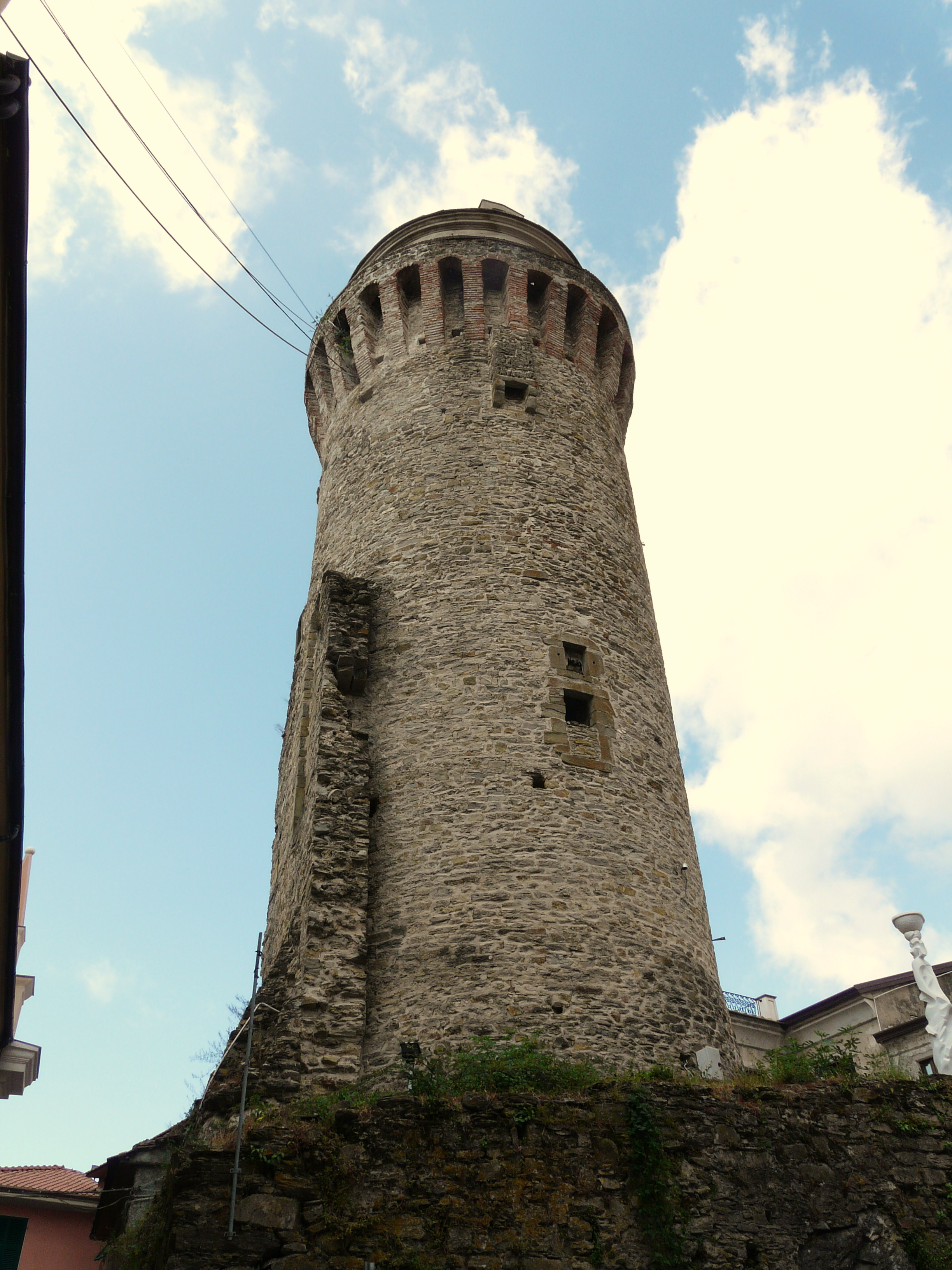 Campanile-torre di Ortonovo, Liguria, Italia